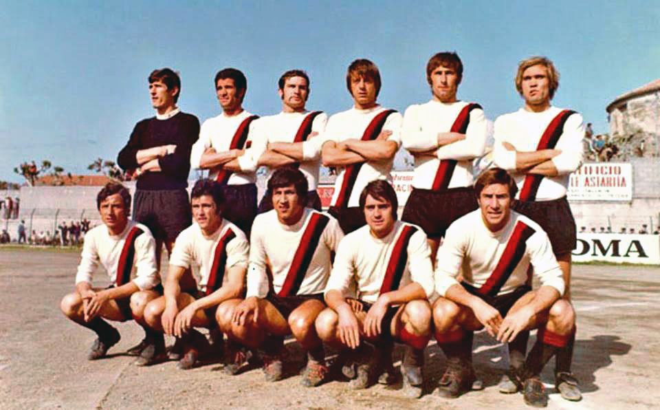 Una formazione del Sorrento nella stagione 1970-71.